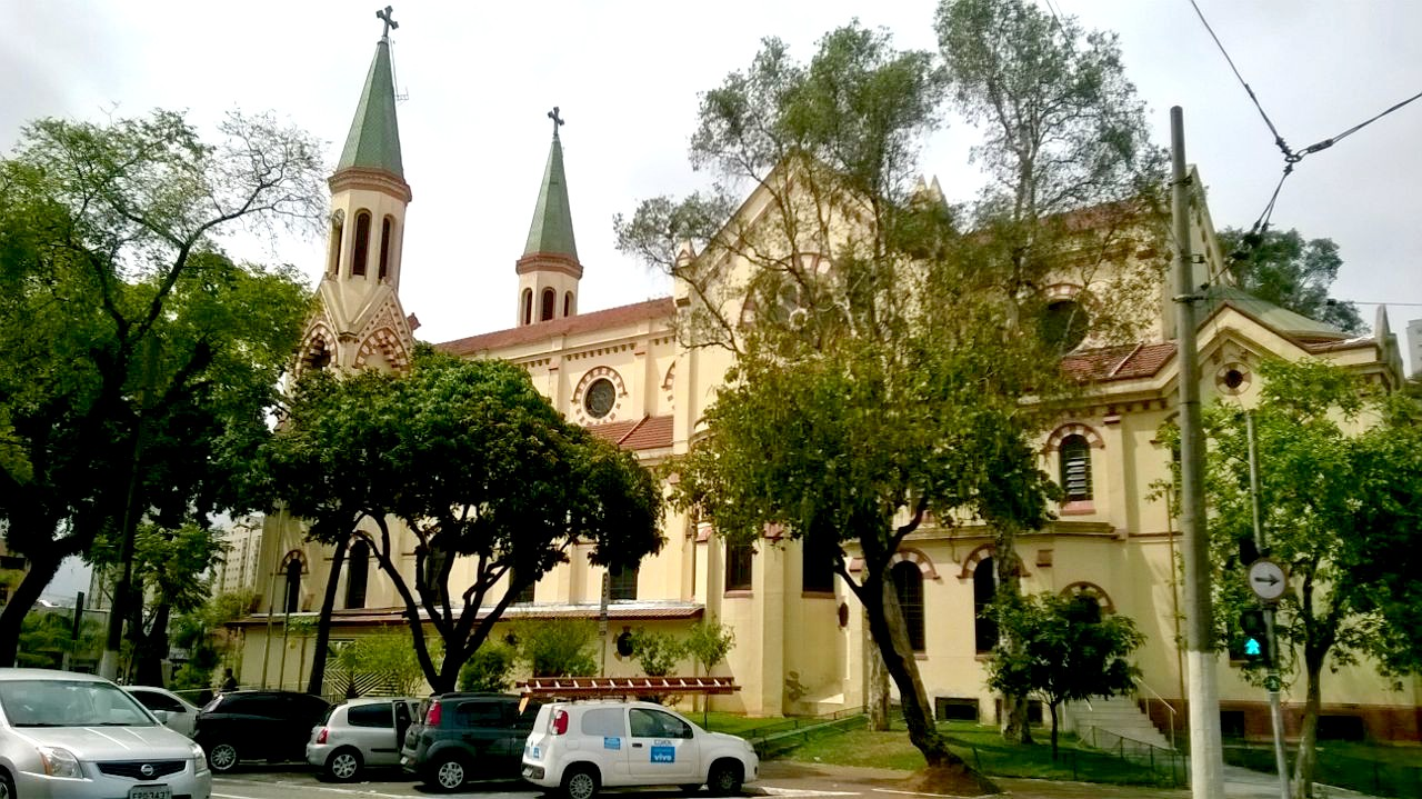 Paróquia construída em 1897 é a vista principal da escola, que fica em frente ao Largo São José do Belém